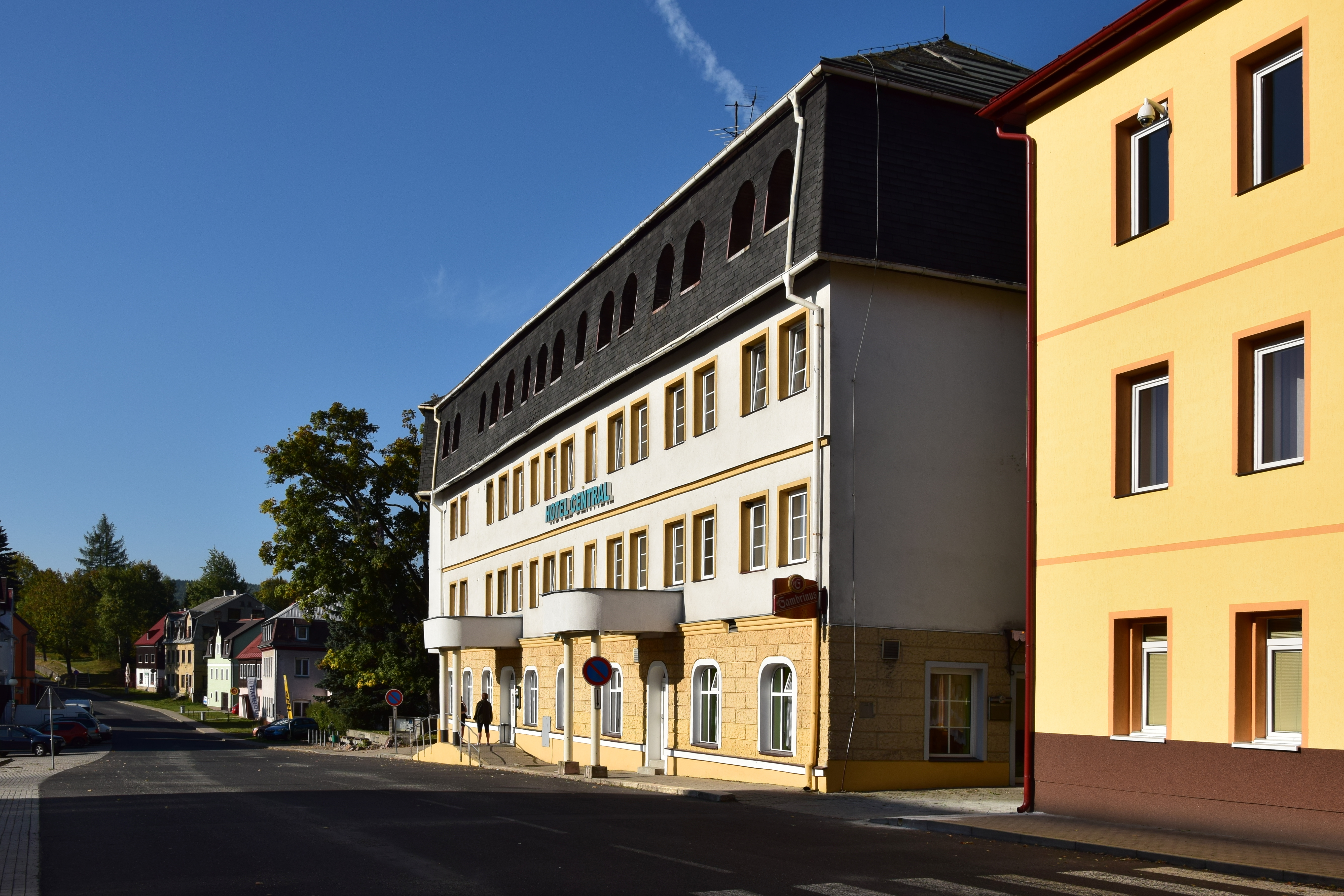 Kovářská – hotel Central